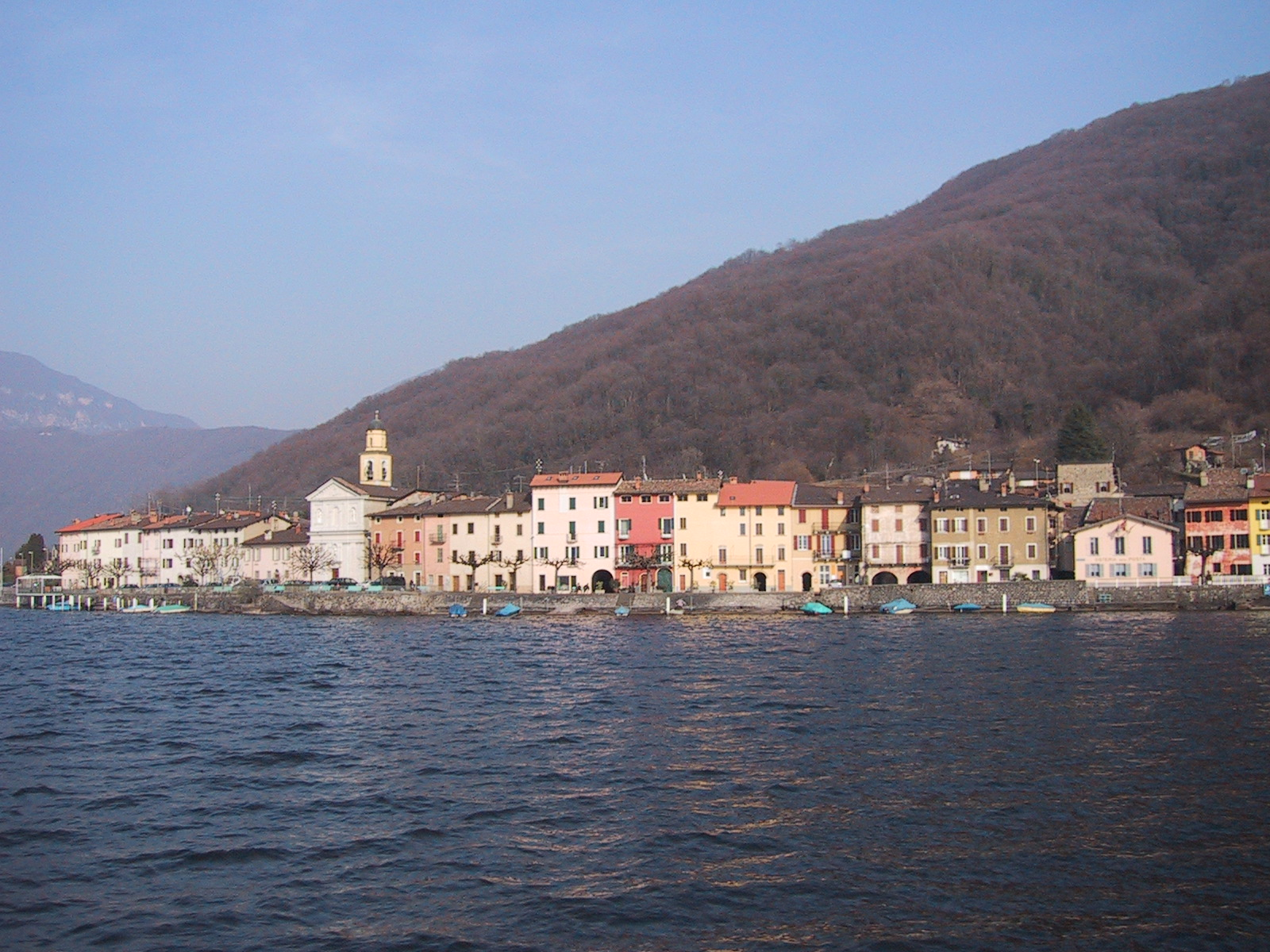 Aufnahme von Brusino TI vom 11.März 2005.